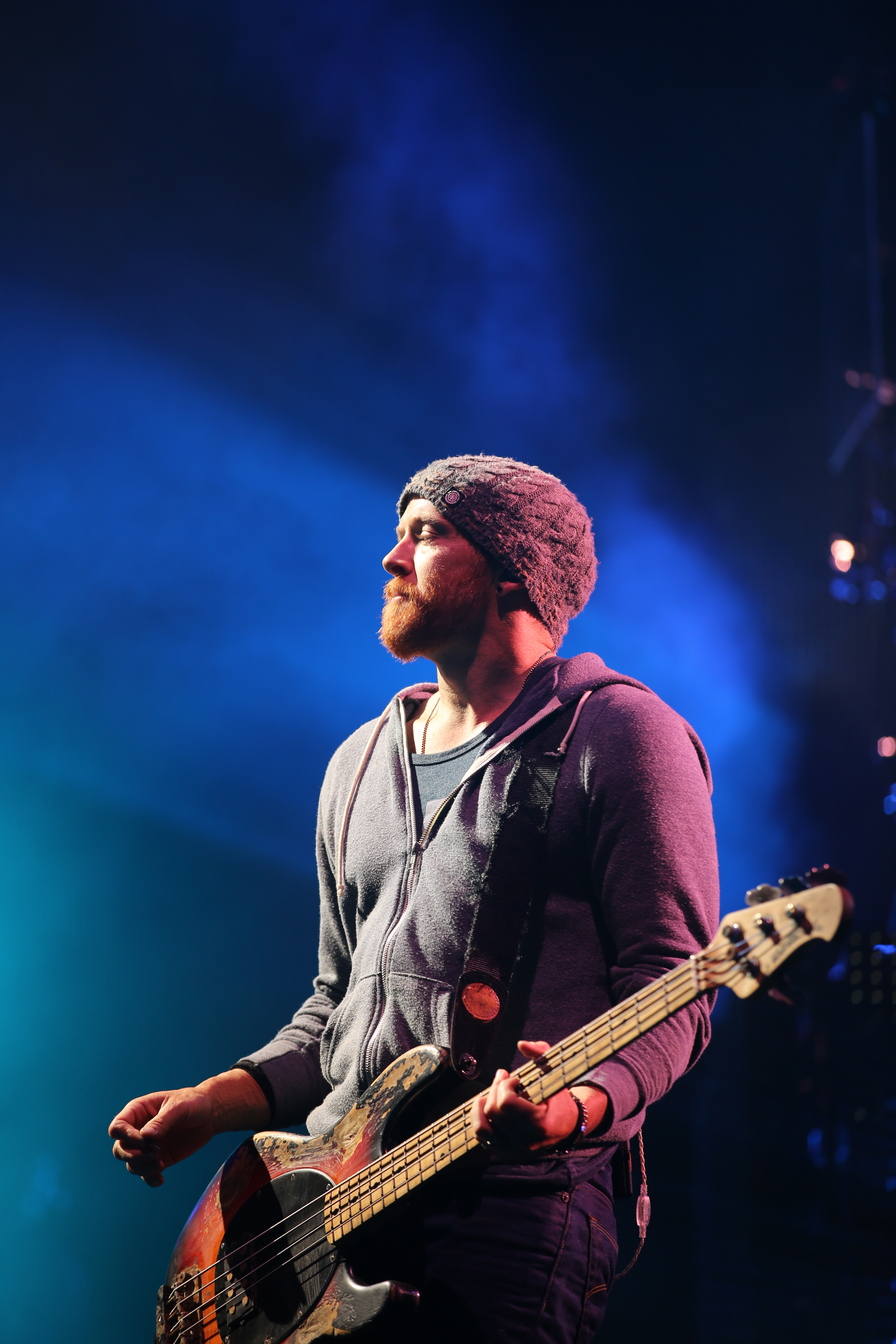 Linkin Park bei Rock am Ring 2014.